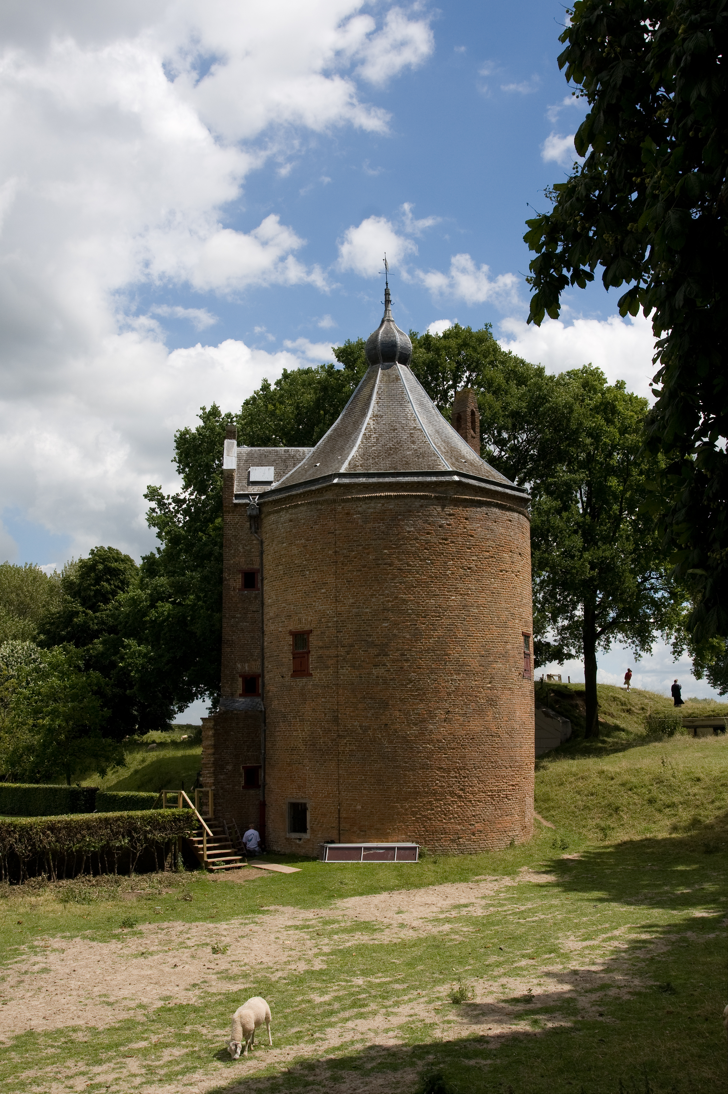 Slot Loevestein - Kruittoren